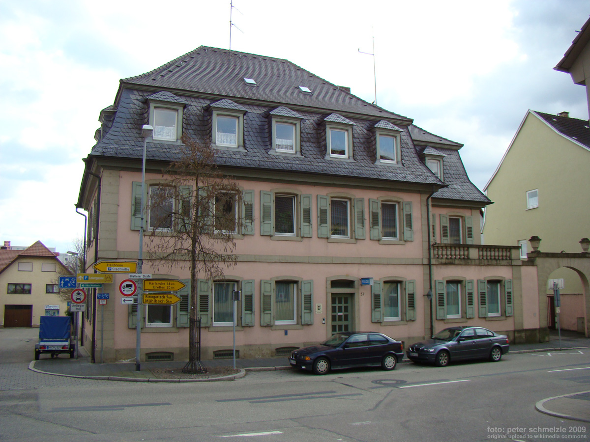 Sog. Amtshaus, erbaut von Stadtschutheiß Erckebrecht in der Brettener Straße 57 in Eppingen (siehe auch Lithographie von Lohmüller 1854 im Aufsatz von Franz Gehrig: Die Ämter der Stadt Eppingen und ihre Inhaber. In: Rund um den Ottilienberg. Beiträge zur Geschichte der Stadt Eppingen und Umgebung, Band 2, Eppingen 1982, S. 24–40